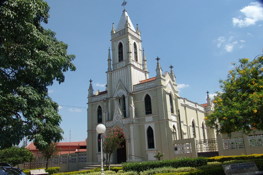 Imagem do município de Dois Córregos, estado de São Paulo, Brasil.